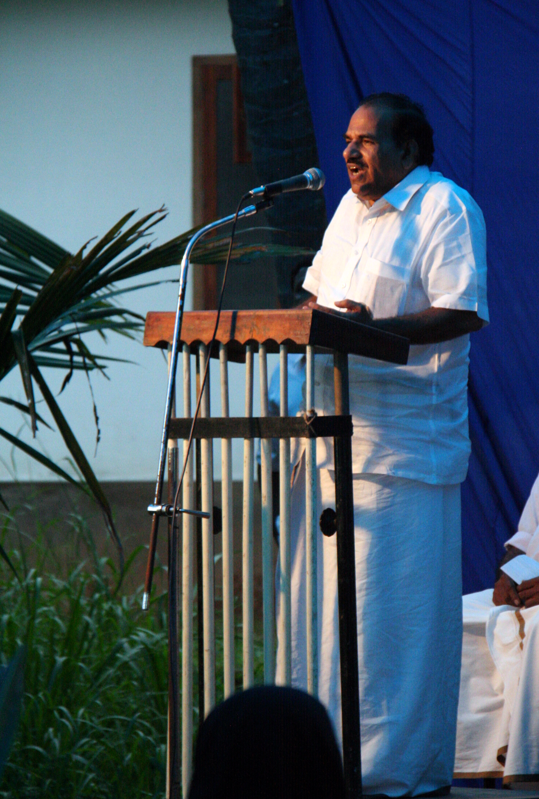 തലശ്ശേരി എം. എൽ. എയും കേരള ആഭ്യന്തരമന്ത്രിയുമായ കോടിയേരി ബാലകൃഷ്ണൻ, തലശ്ശേരി നഗരസഭയുടെ കുടിവെള്ള പദ്ധതി ഉദ്‌ഘാടനചടങ്ങിൽ പ്രസംഗിക്കുന്നു.